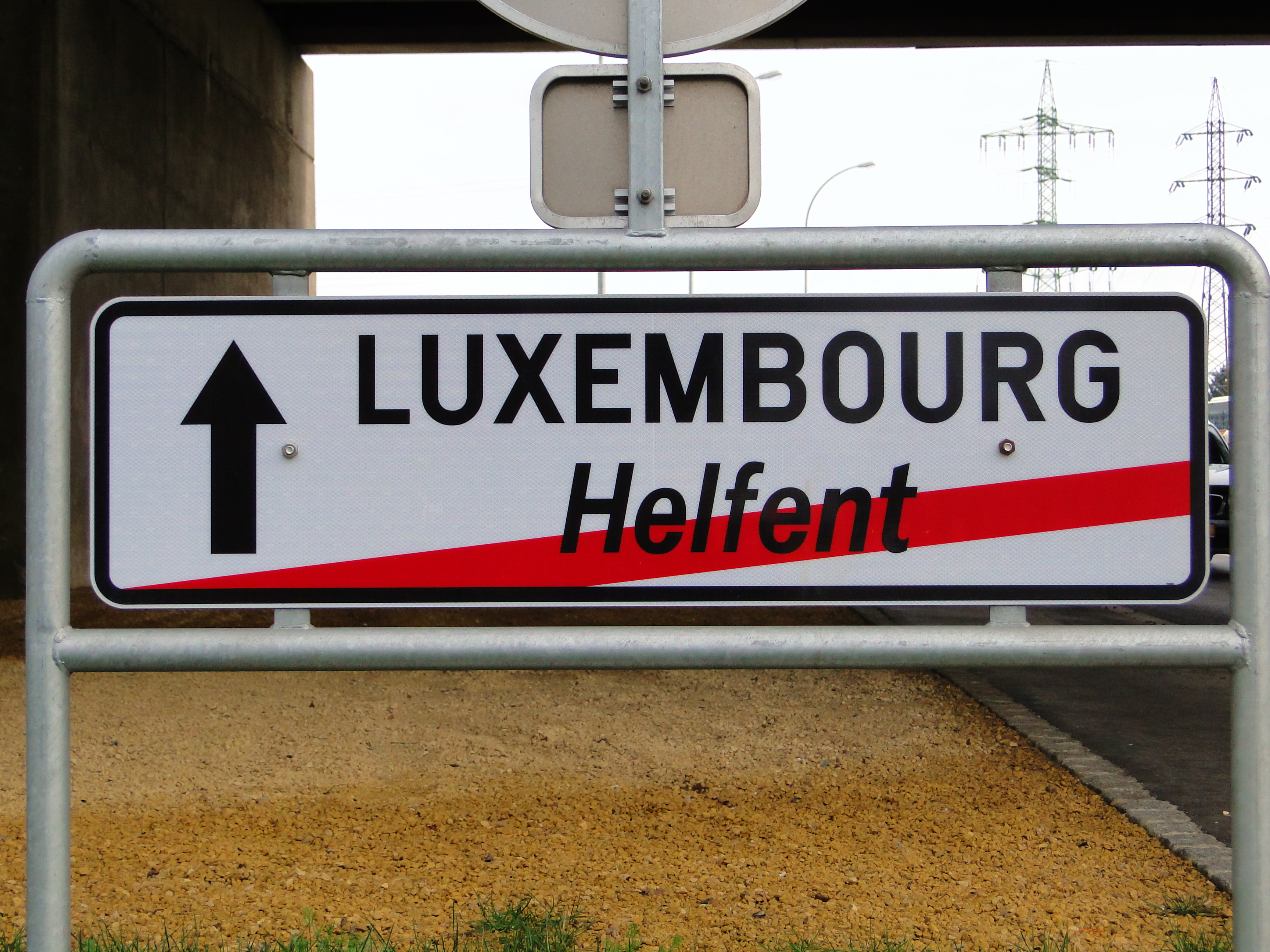 Verkéiersschëld F,14b "Enn Lieu-dit" aus dem lëtzebuerger Code de la Route.